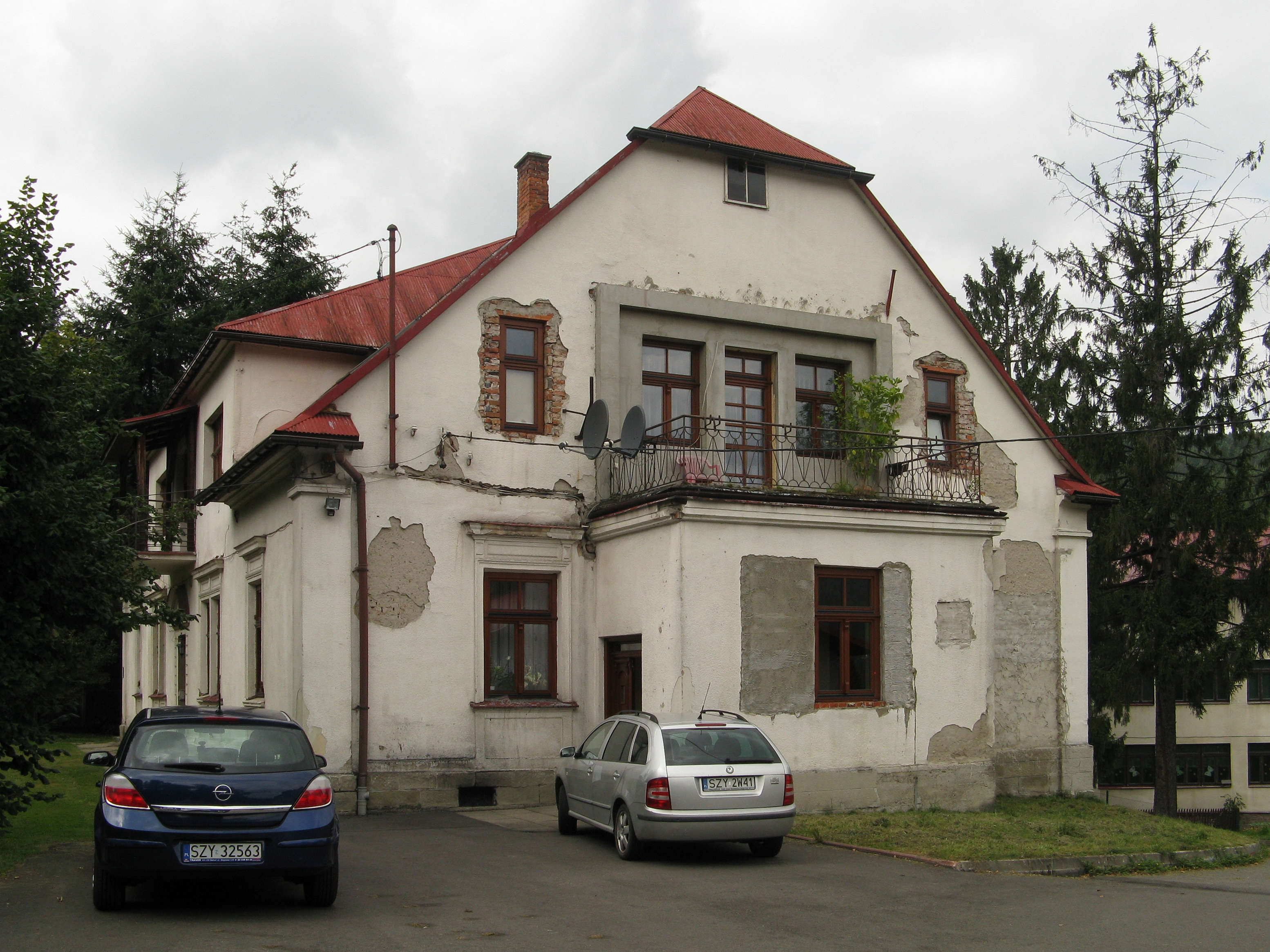 Rajcza, plebania Wikidata has entry Q30067347 with data related to this item.